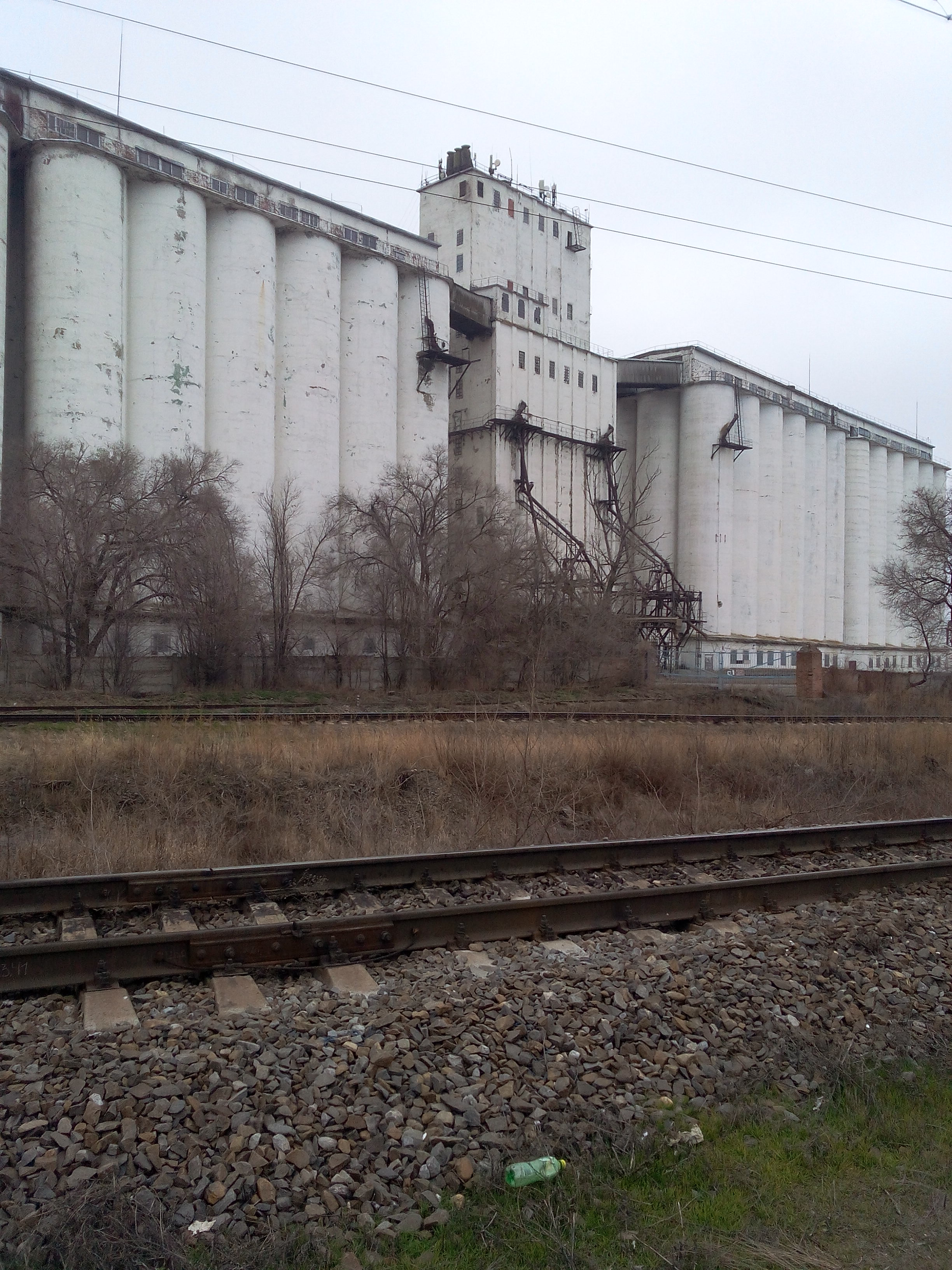 г. Сальск, здание элеватора "Юг-Руси"